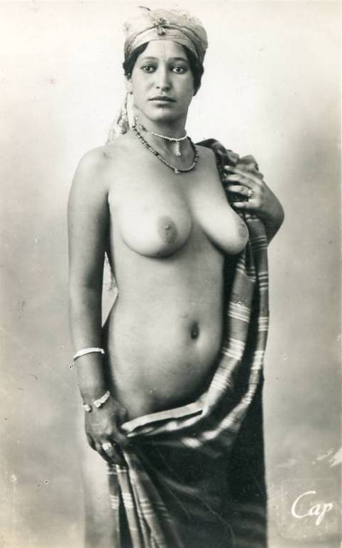 Compagnie des Arts Photomécaniques postcard